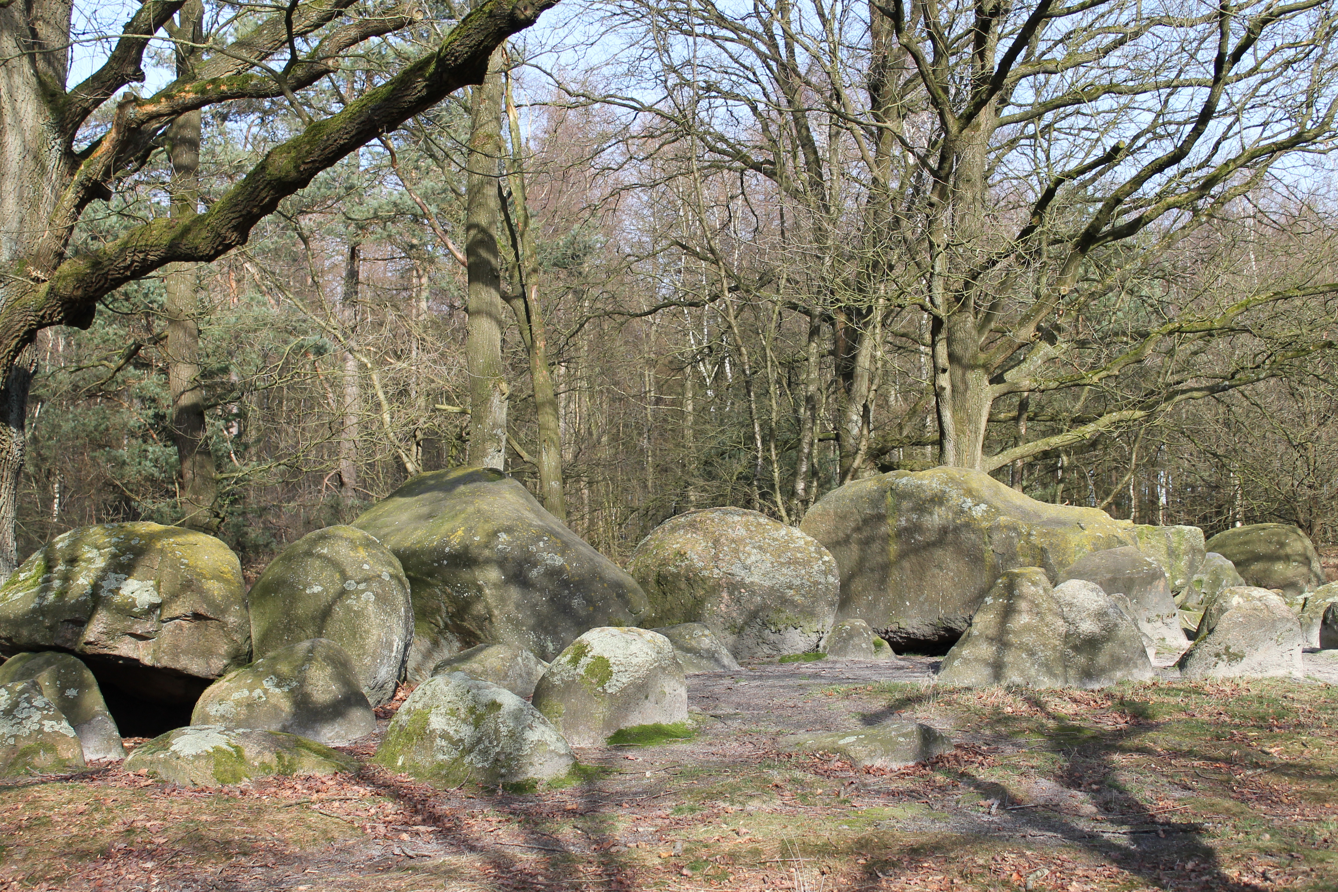 Das Gelände des Königsgrabs Groß Berßen im NSG Holschkenfehn